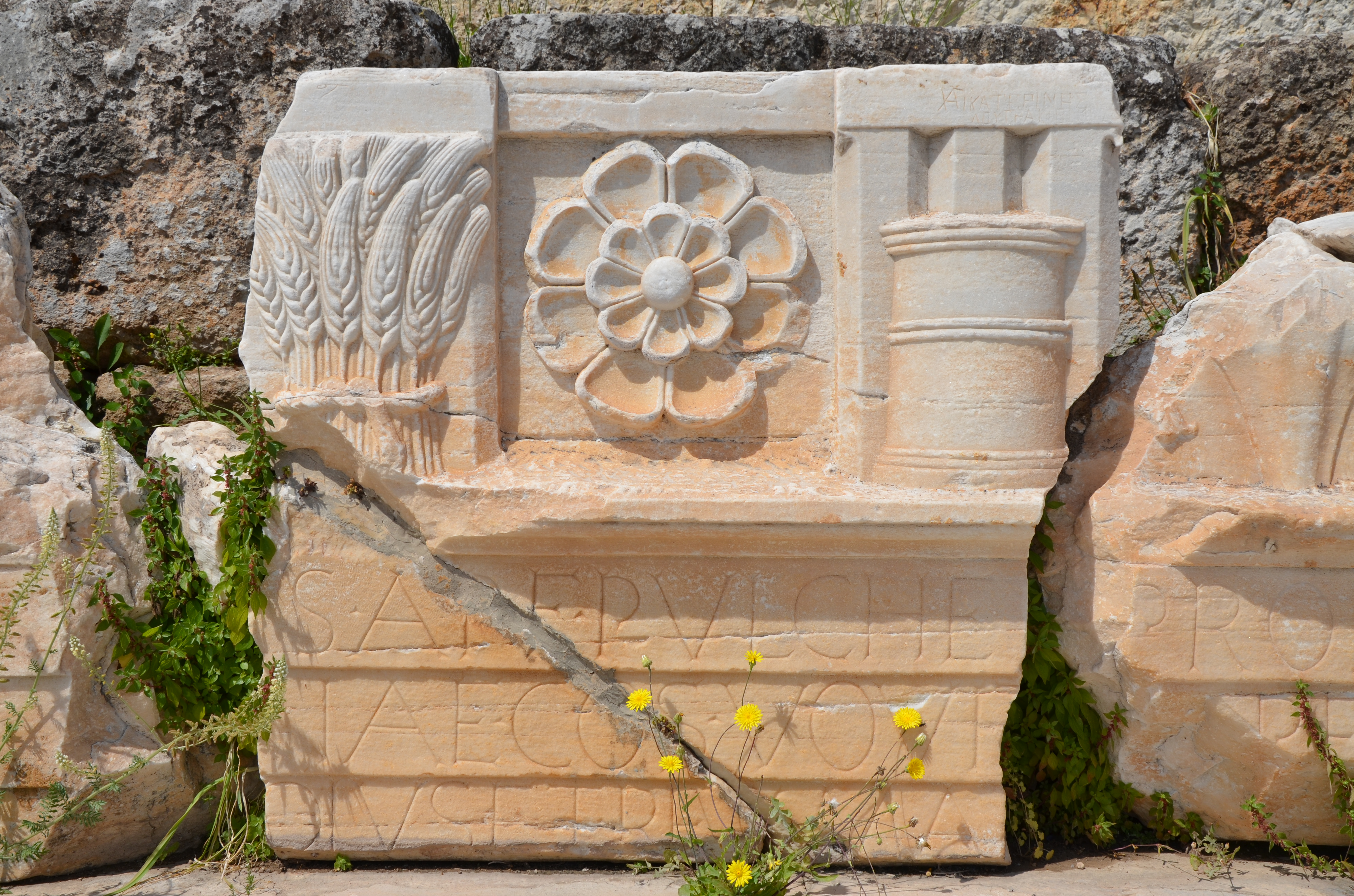 Eleusis